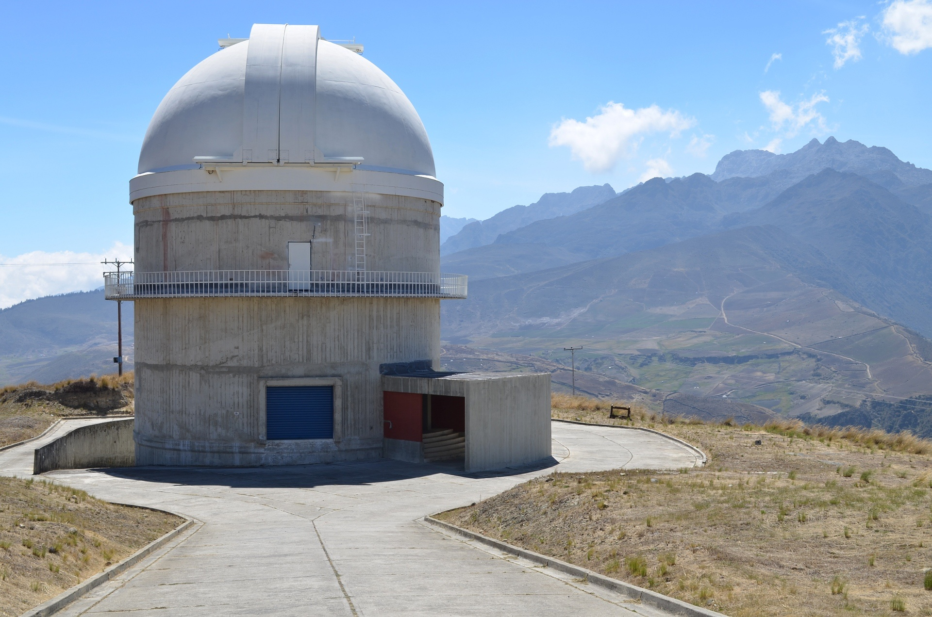 Centro de Investigaciones de Astronomía Francisco J. Duarte Llano del Hato. Duarte